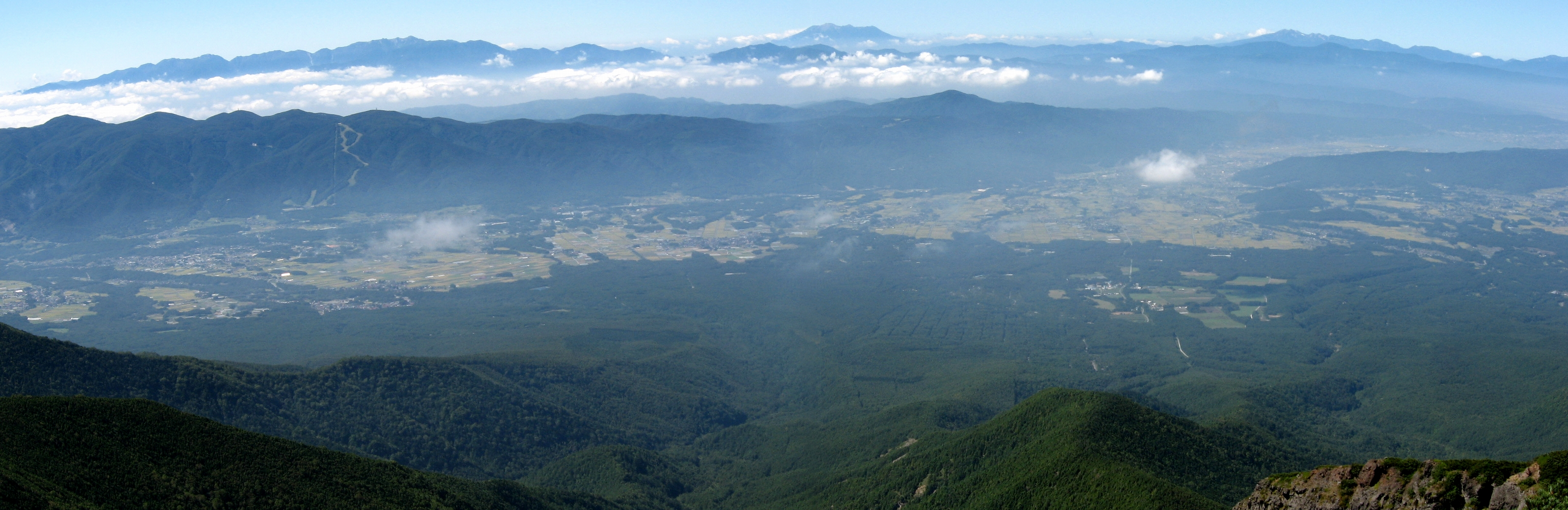 八ヶ岳から見た諏訪盆地